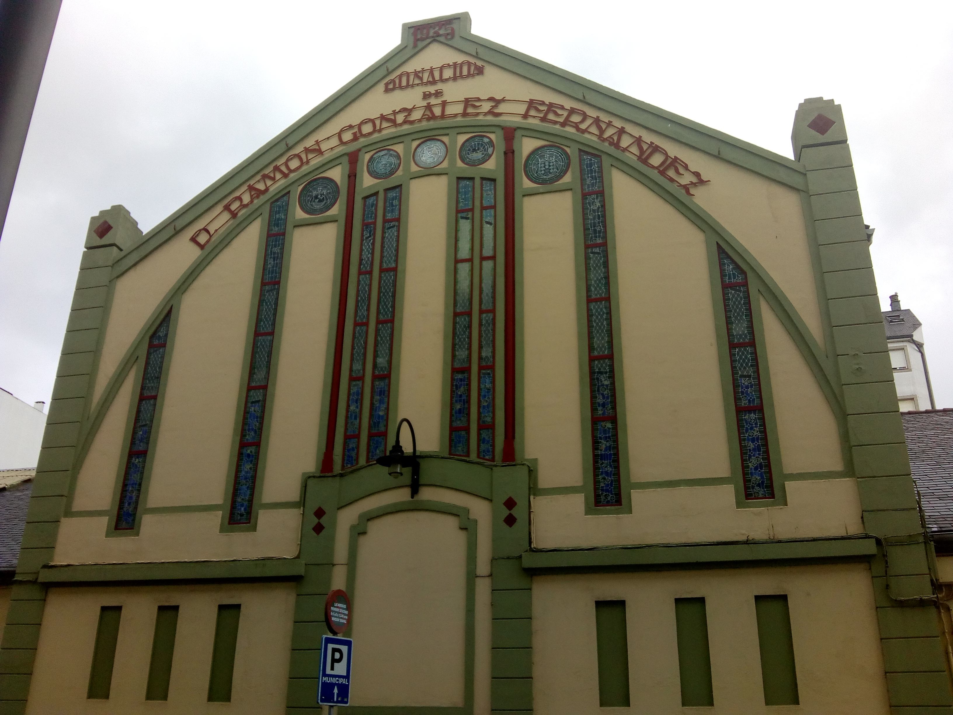 Fachada oeste do corpo central da praza de abastos de Ribadeo